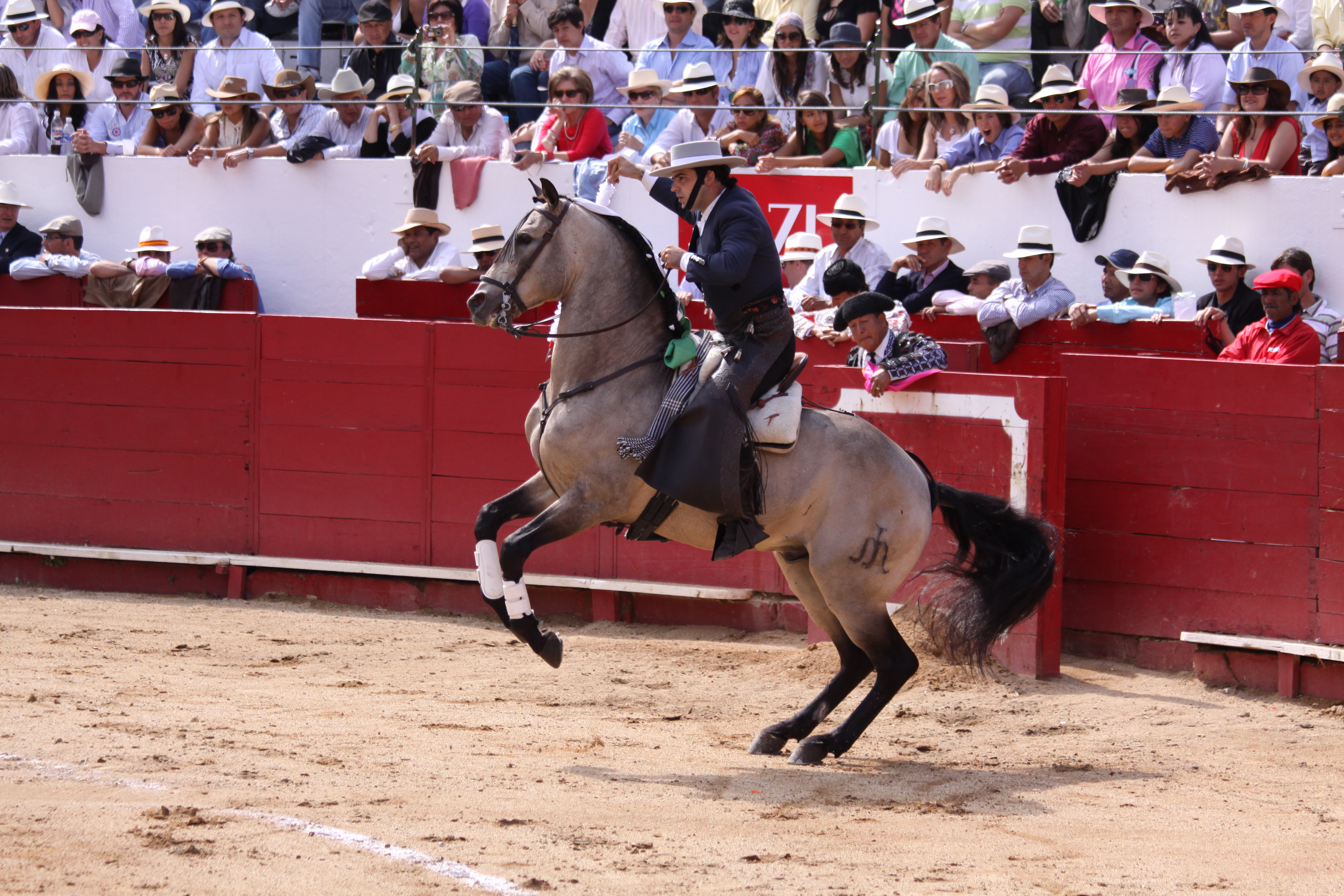 Rejoneador Álvaro Montes.